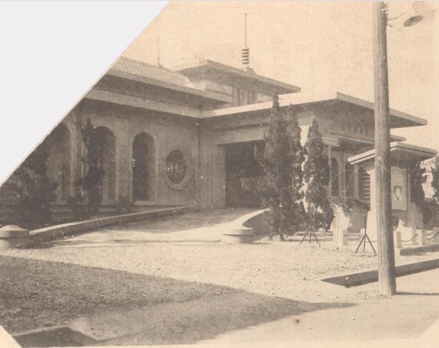 中文（台灣）: 此旗山郡役所建築為1931年完工